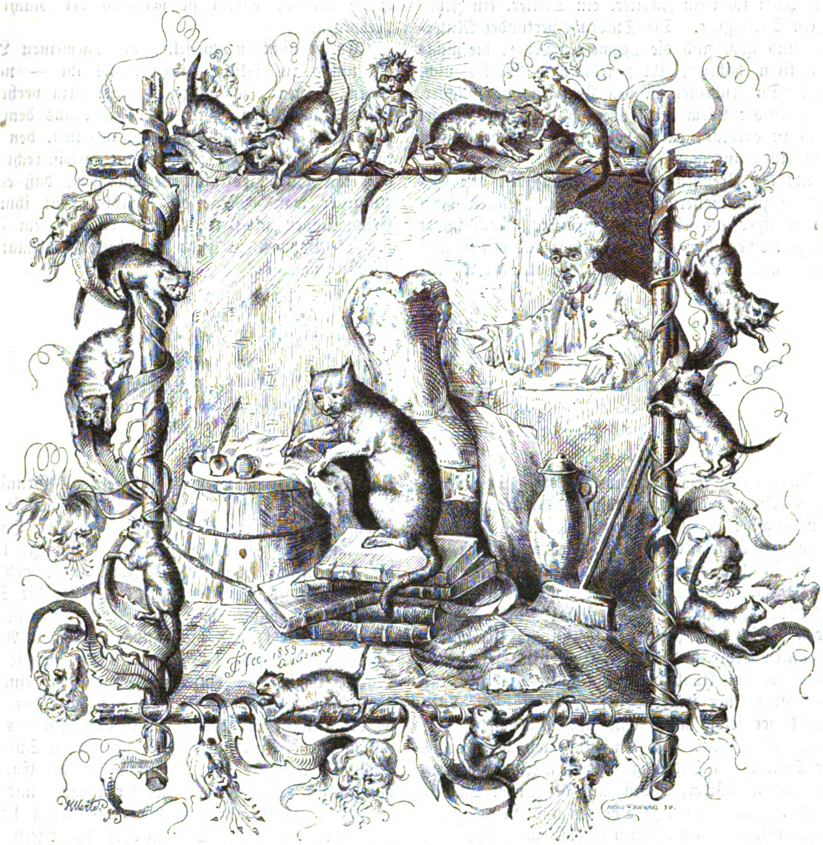 Kater Murr. Handzeichnung von König Ferdinand von Portugal, 1859.